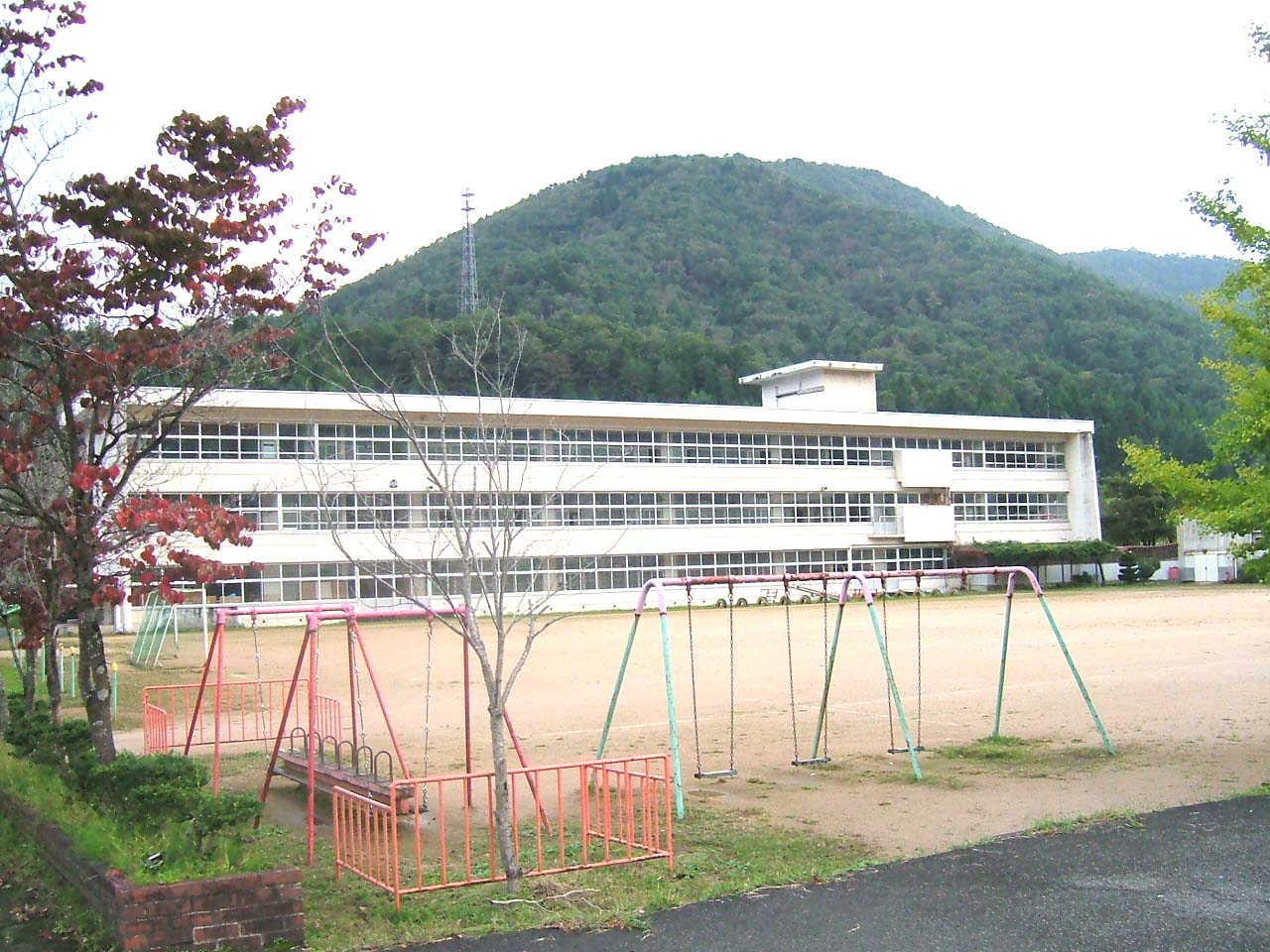 旧関宮町立関宮小学校校舎